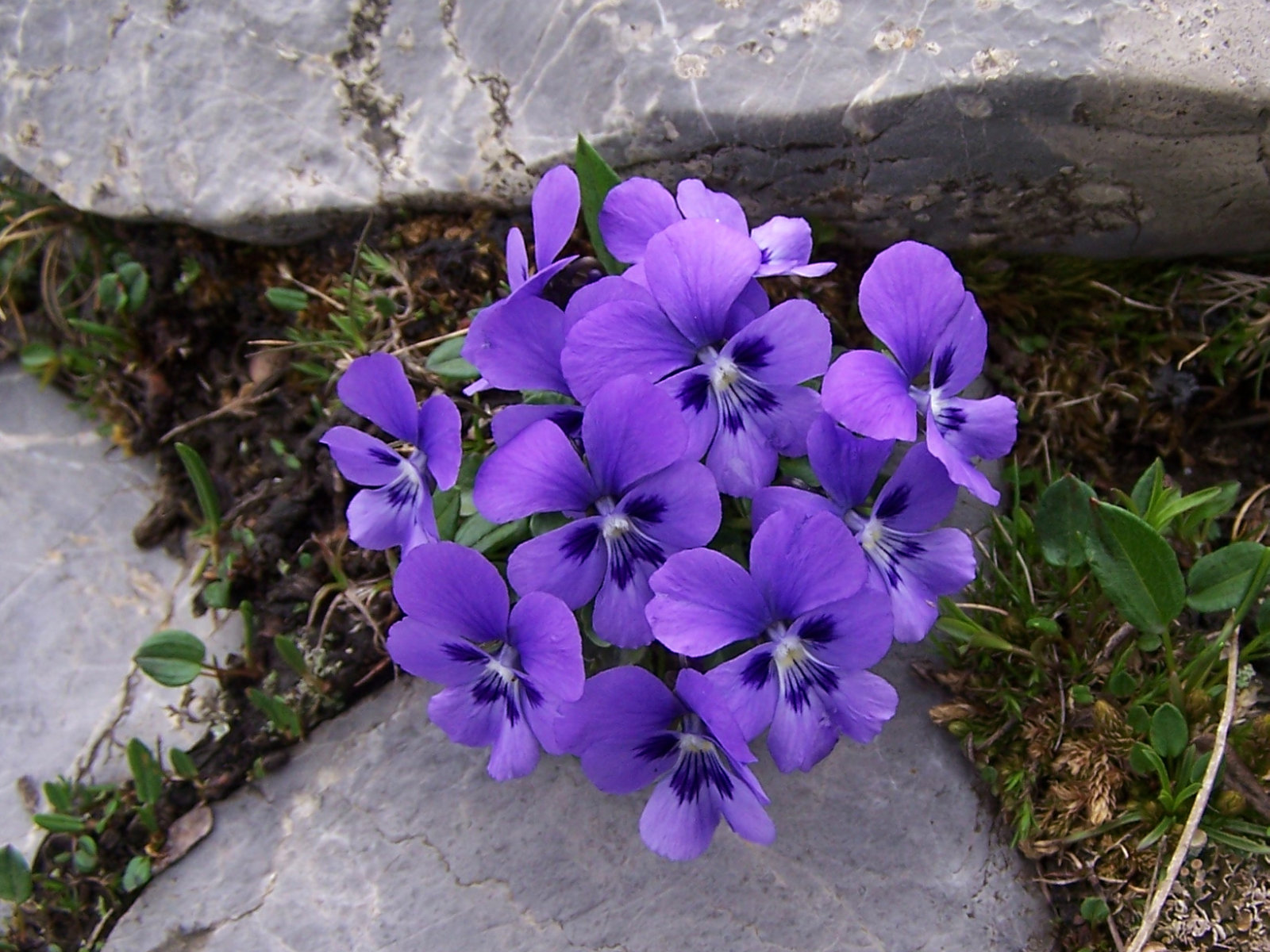 Viola alpina (pl. fiołek alpejski), habitat; Tatra Mountains, Czerwone Wierchy, Kobylarzowy Żleb